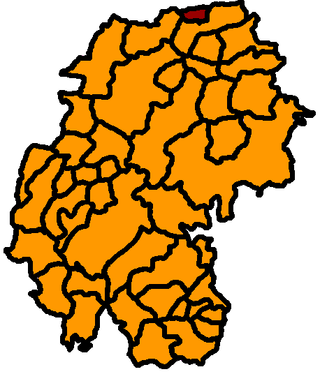 Rockhausen hervorgehoben, Ilm-Kreis